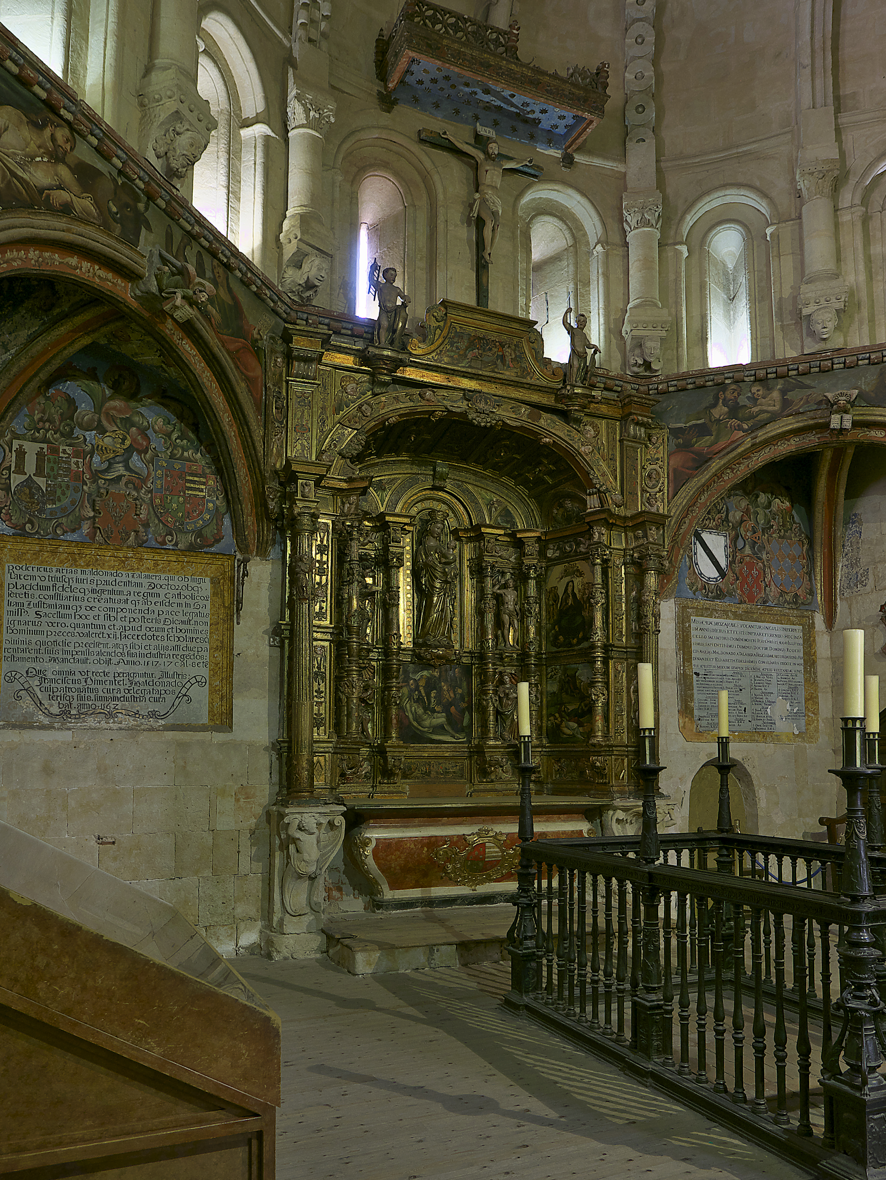 Rodrigo Arias Maldonado (†16-08-1517), marqués de Talavera, concierta su capilla funeraria en el claustro de la Catedral Vieja de Salamanca.